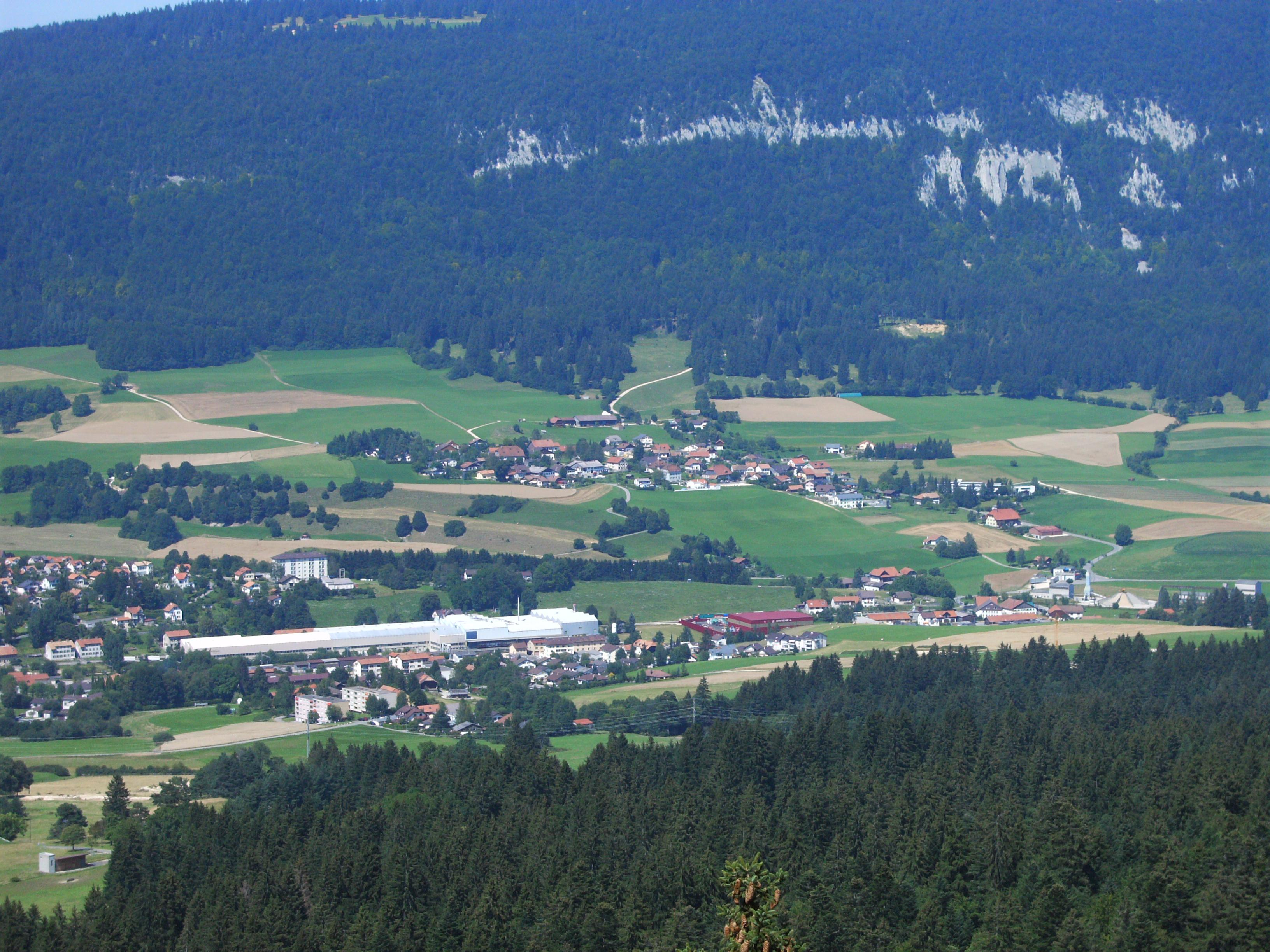 Vue de la commune de Reconvilier (bas et gauche de la photo) et de Loveresse (centre de la photo). Prise de la photo depuis la montagne de Montoz, point de vue du Fülliloch.